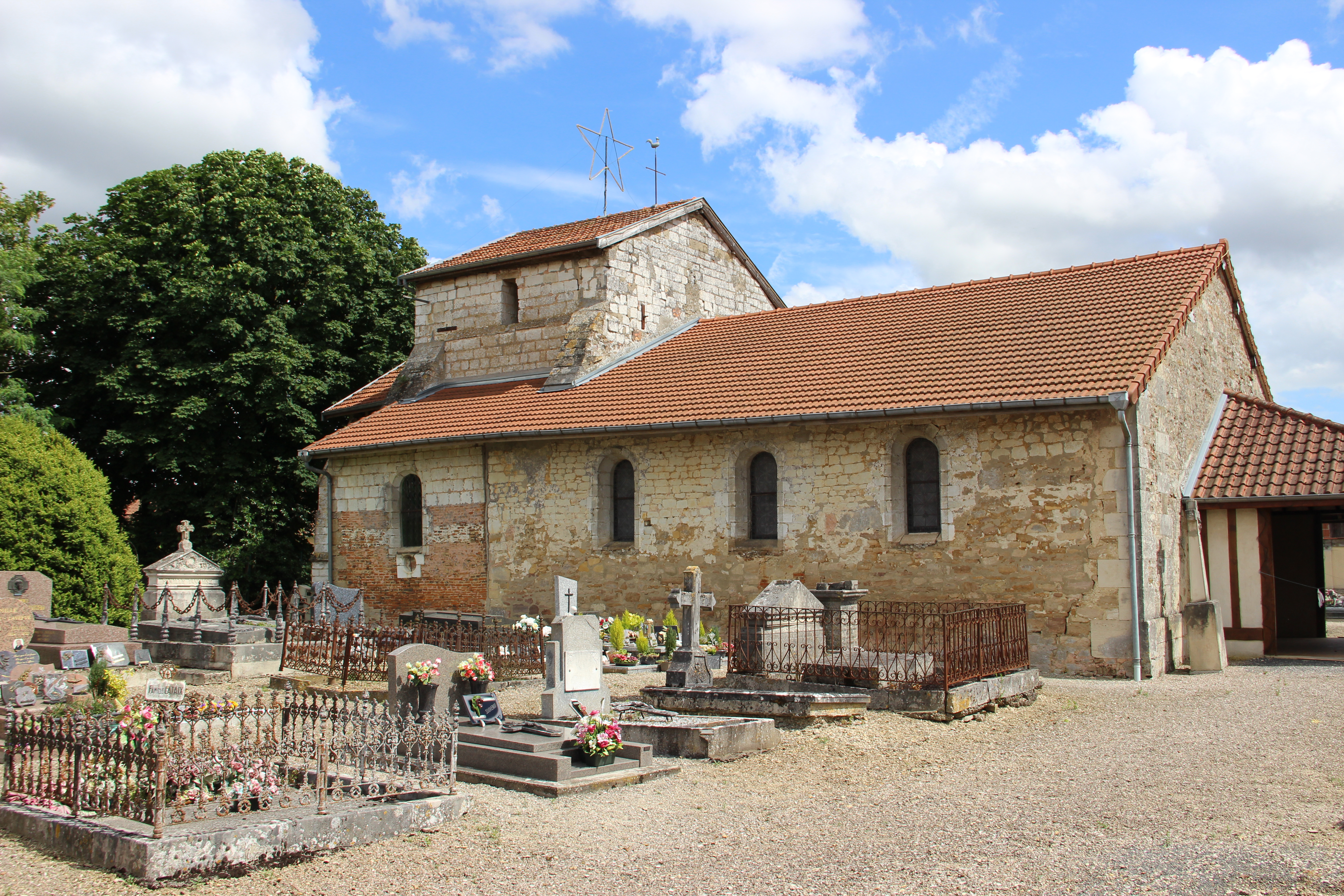 Eglise de Plichancourt